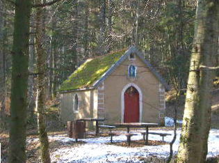 Chapelle Sainte-Catherine de la Montagne des Boulles à Rougemont-le Château (90110) France Photo prise le 3 mars 2004 par LP90 Copyright : GFDL LP90